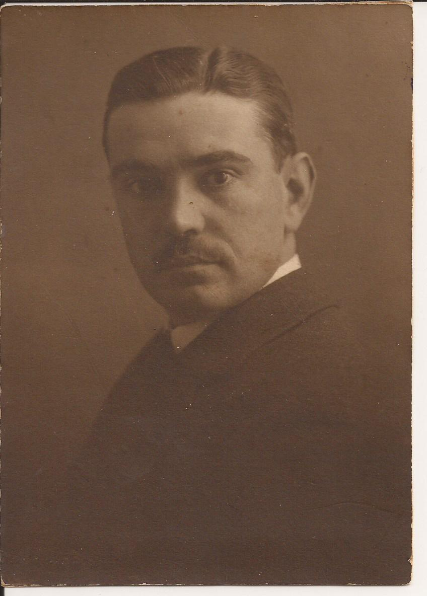 Fotografía de Leandro de Aguirreche Picabea